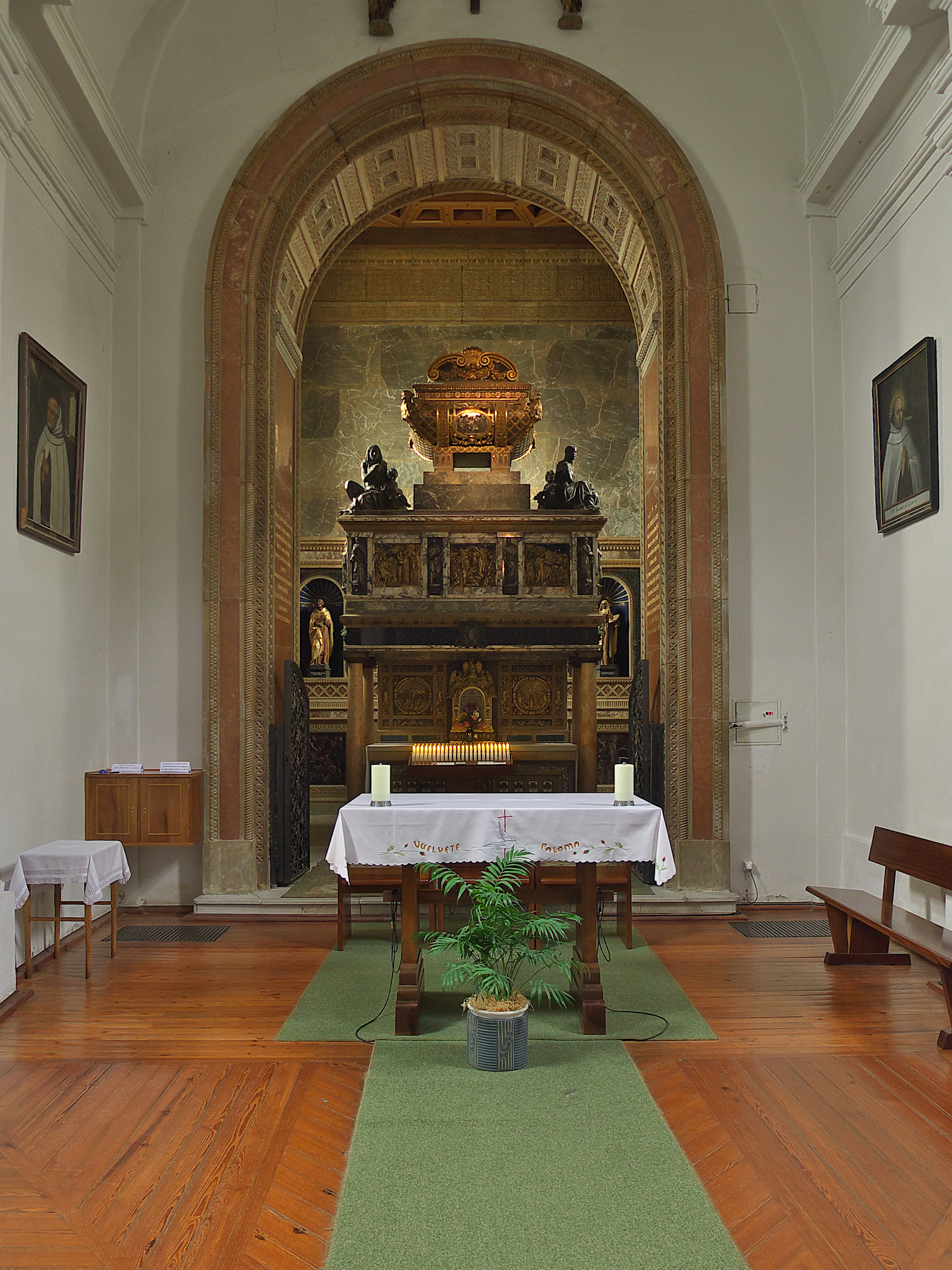 Convento de Carmelitas Descalzos (Segovia). Capilla en la nave del Evangelio. Sepulcro de San Juan de la Cruz